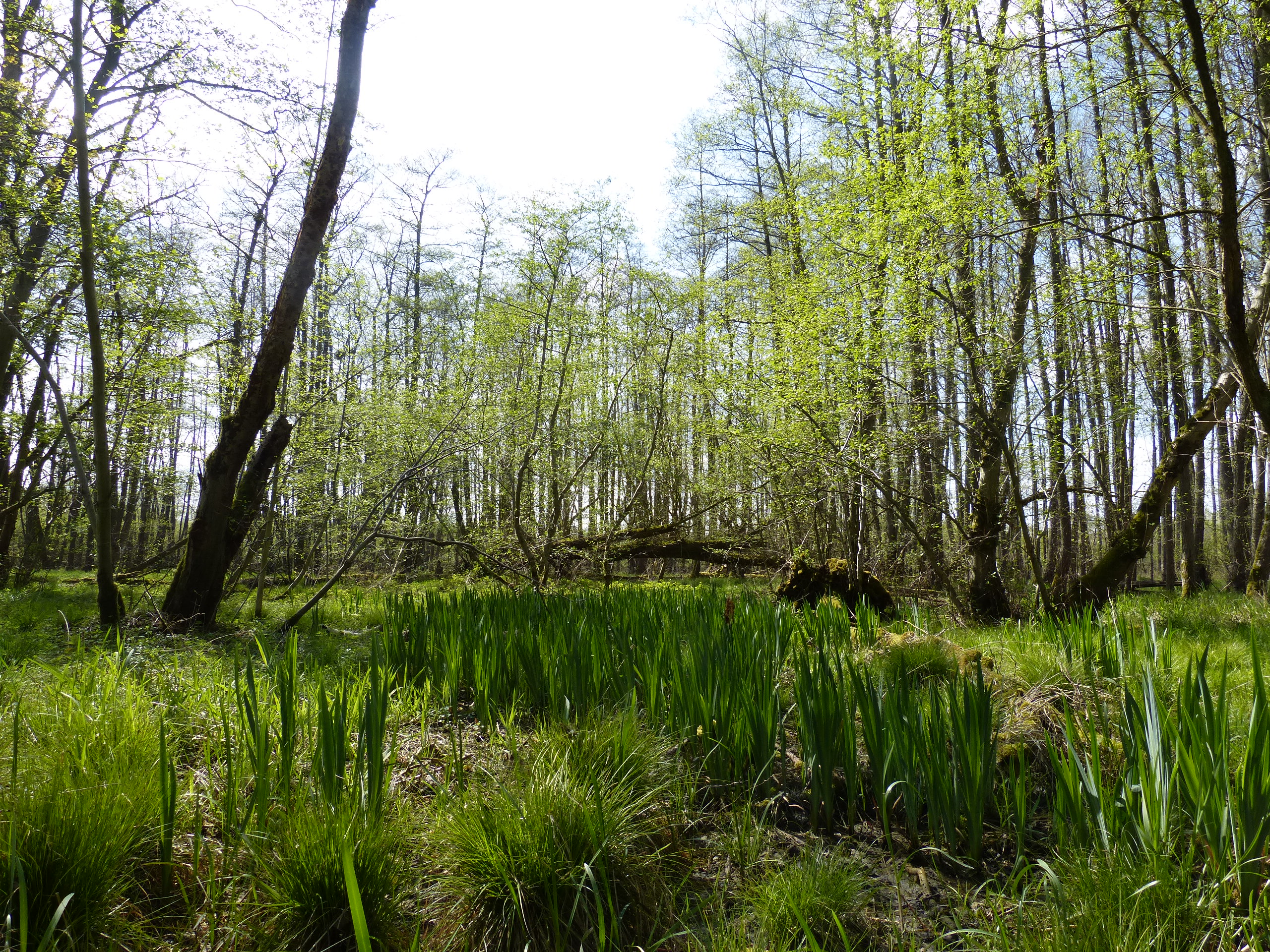 Feuchtgebiete im Wald, Naturschutzgebiet „Auf dem Stein“ in Menden